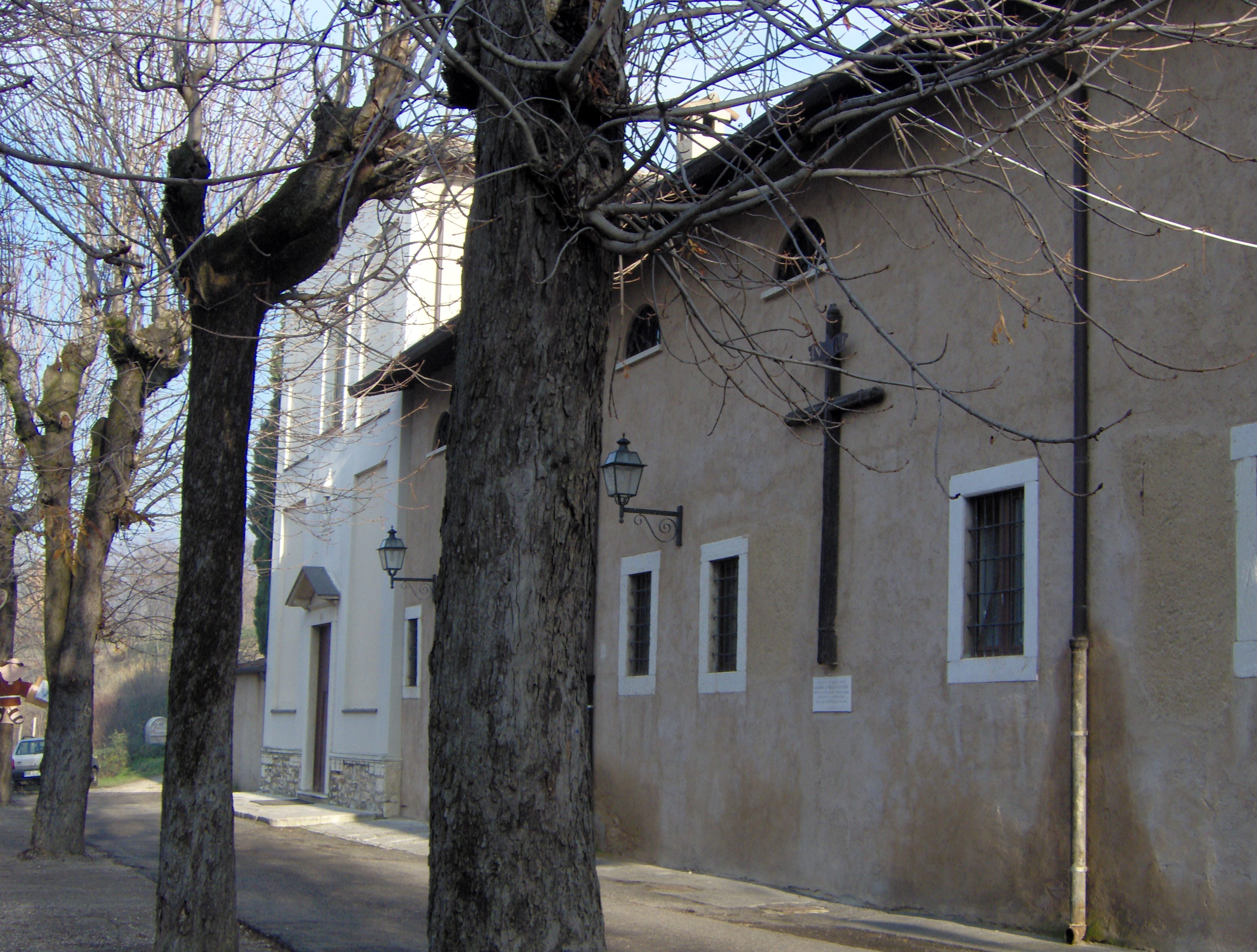 Convento San Pietro in Colle, Rezzato